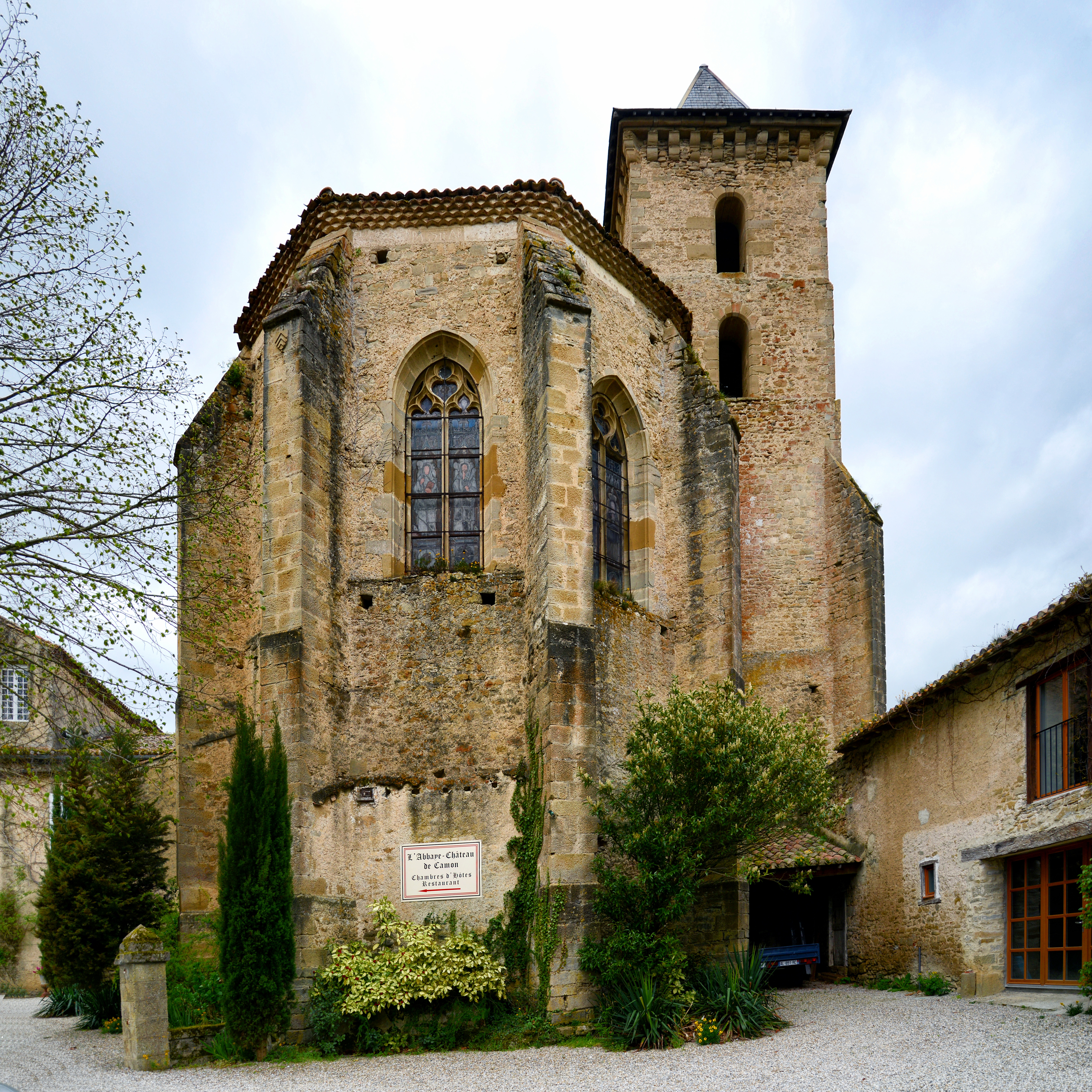 Camon, Ariège (Midi-Pyrénées) - Abbaye château de Camon